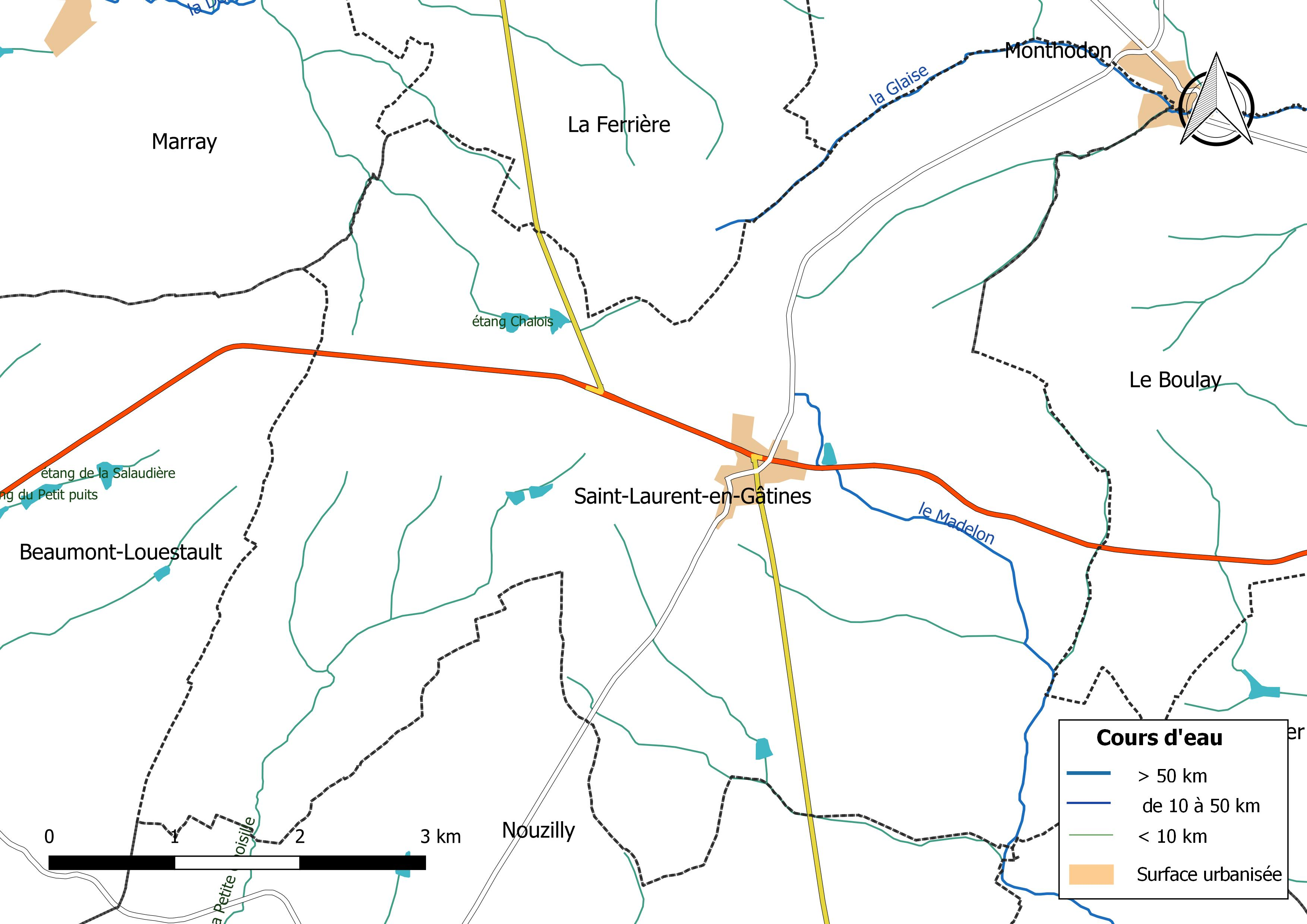 Carte du réseau hydrographique de la commune de Saint-Laurent-en-Gâtines (France).